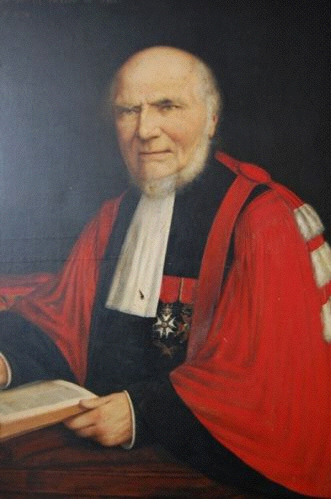 Portrait d'Edouard Delpech (Villefranche 1797- Toulouse 1864), jurisconsulte, doyen de l'Université de Toulouse.